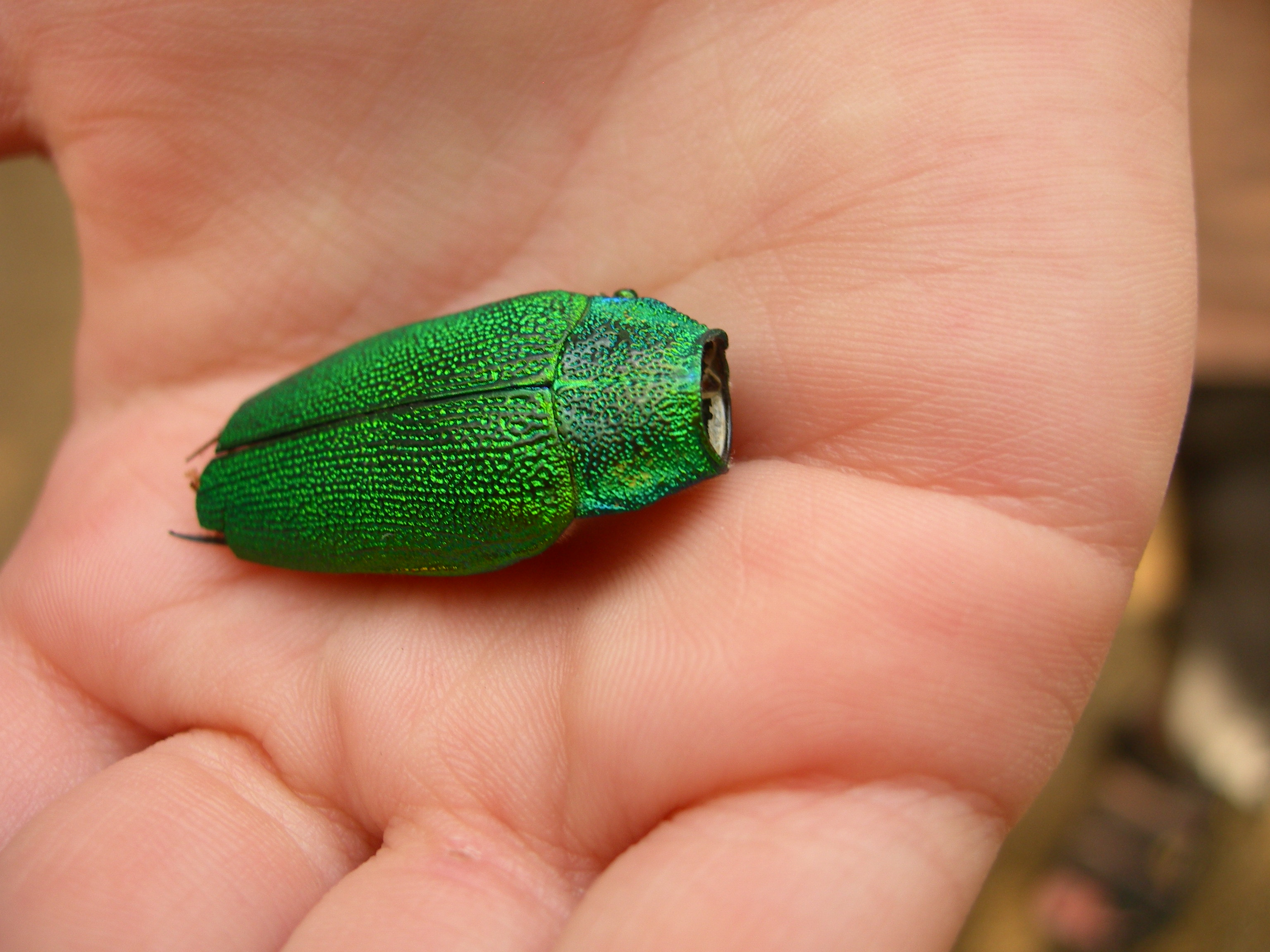 ברקנית האשל נטולת ראש, עינות צוקים רישיון נוצר על ידי משתמש:Judith27k